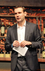 Alexandre Ricard, PDG de Pernod Ricard depuis février 2015 lors du Capital Market Day de Dublin en 2014